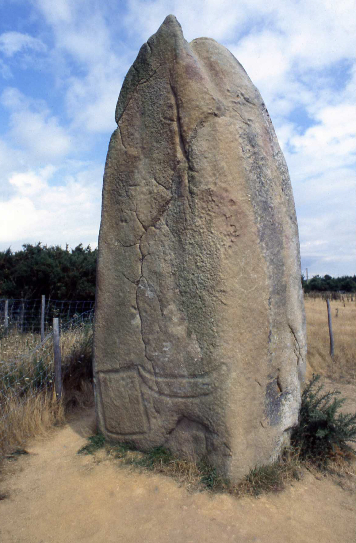 Menhir